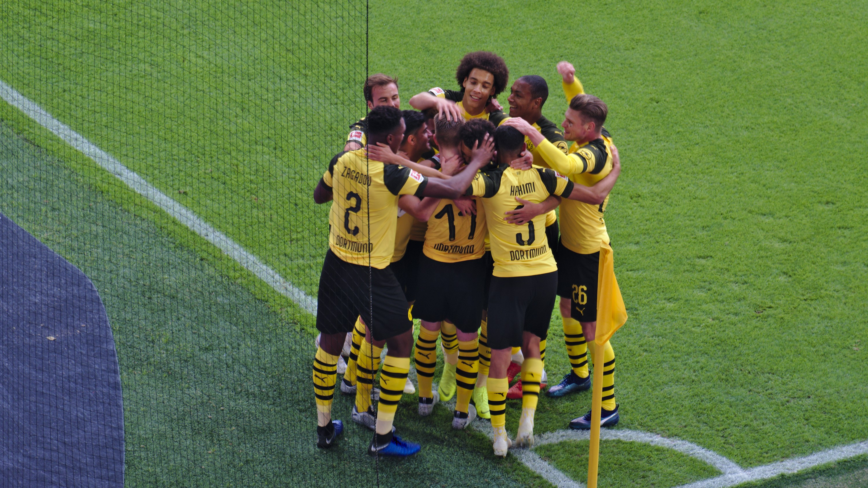 Torjubel von Spielern von Borussia Dortmund nach dem vermeintlichen (Abseits) 1:0 gegen Hertha BSC Berlin im Bundesligaspiel am 27.10.2018.